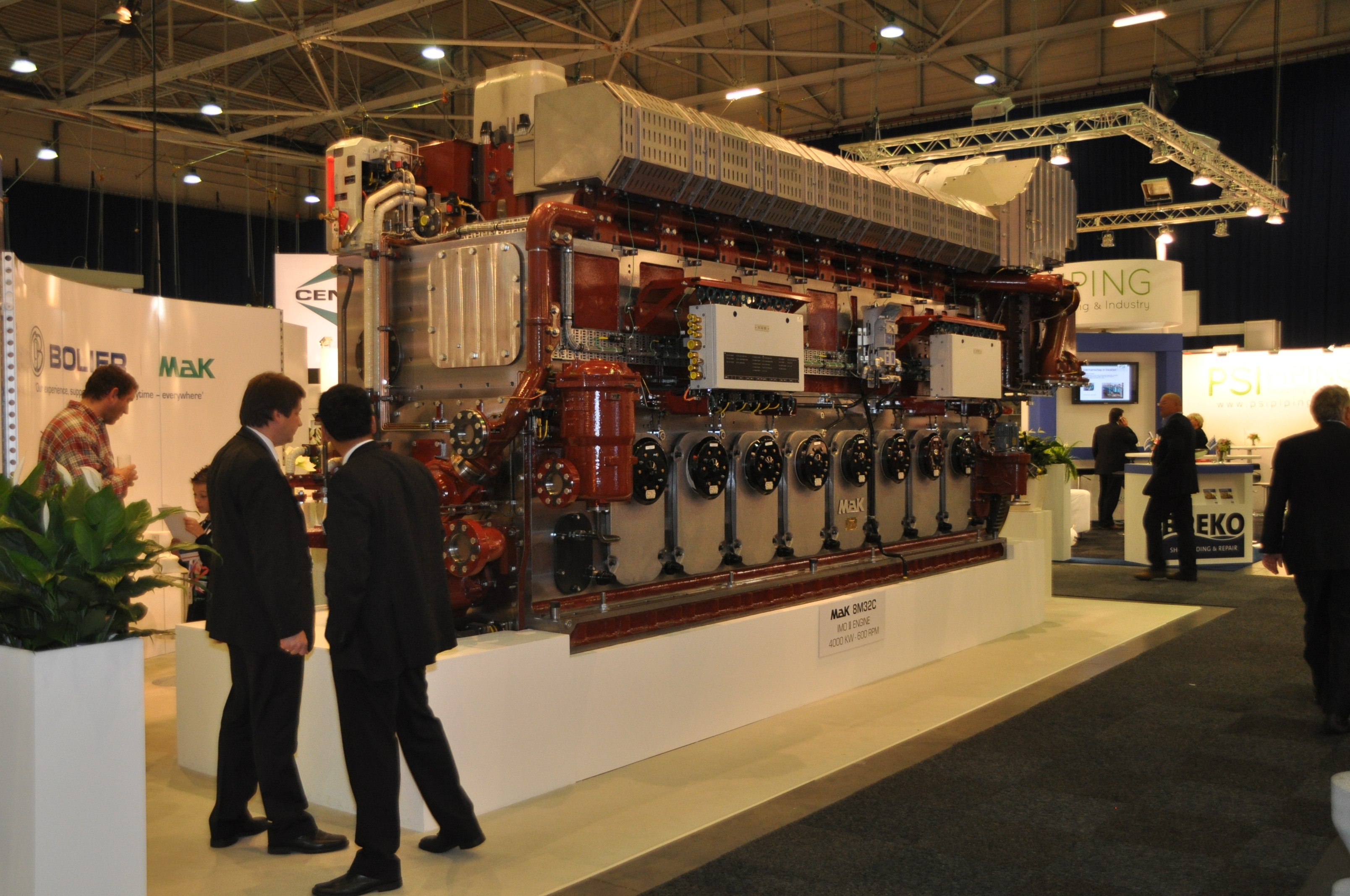 MaK marine diesel 8M32C IMO II engine 4000 KW 600 RPM